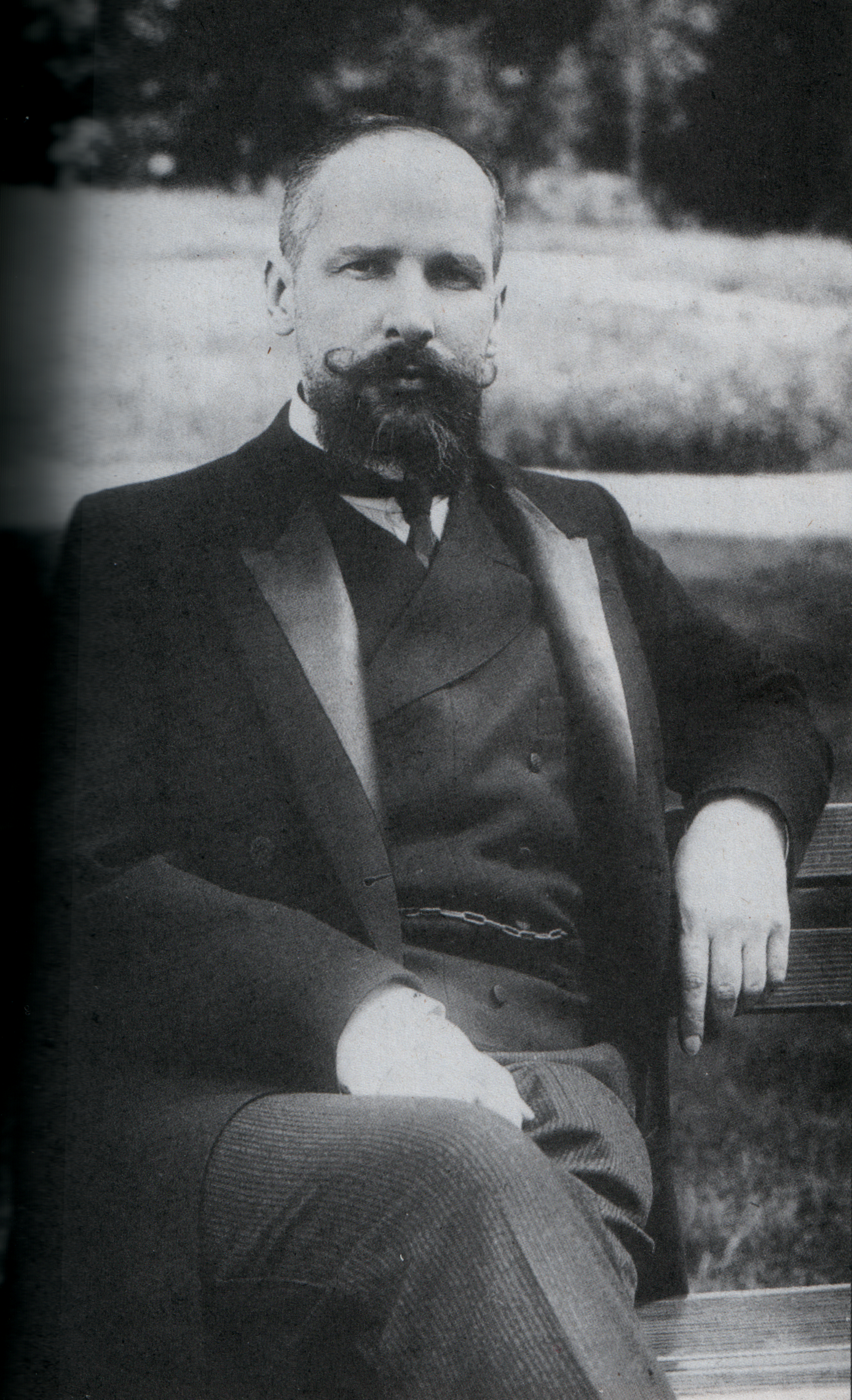 El primer ministro ruso Piotr Stolypin en el parque Yelagin de San Petersburgo, en 1906.